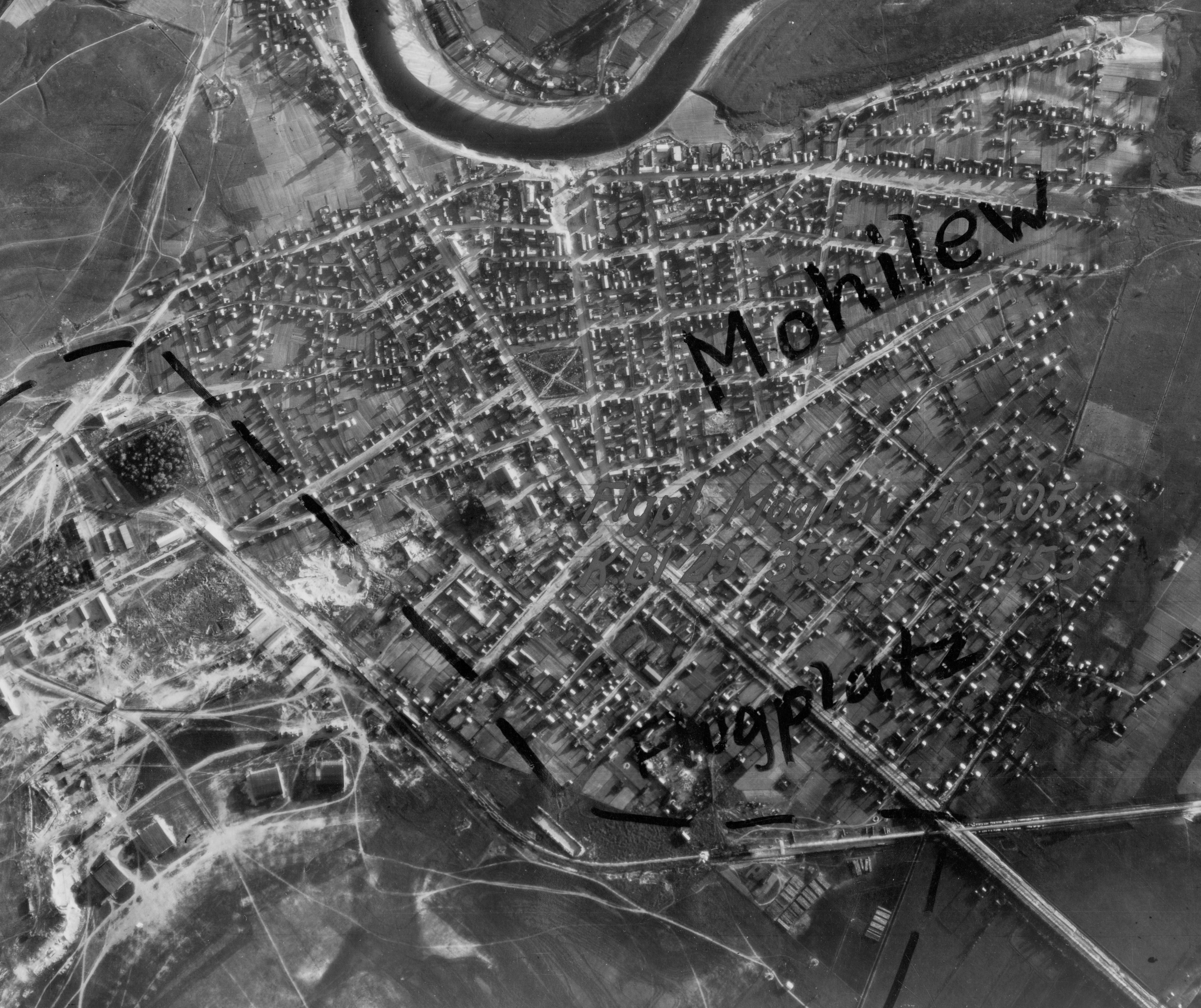 Магілёў. Нямецкі аэрафотаздымак